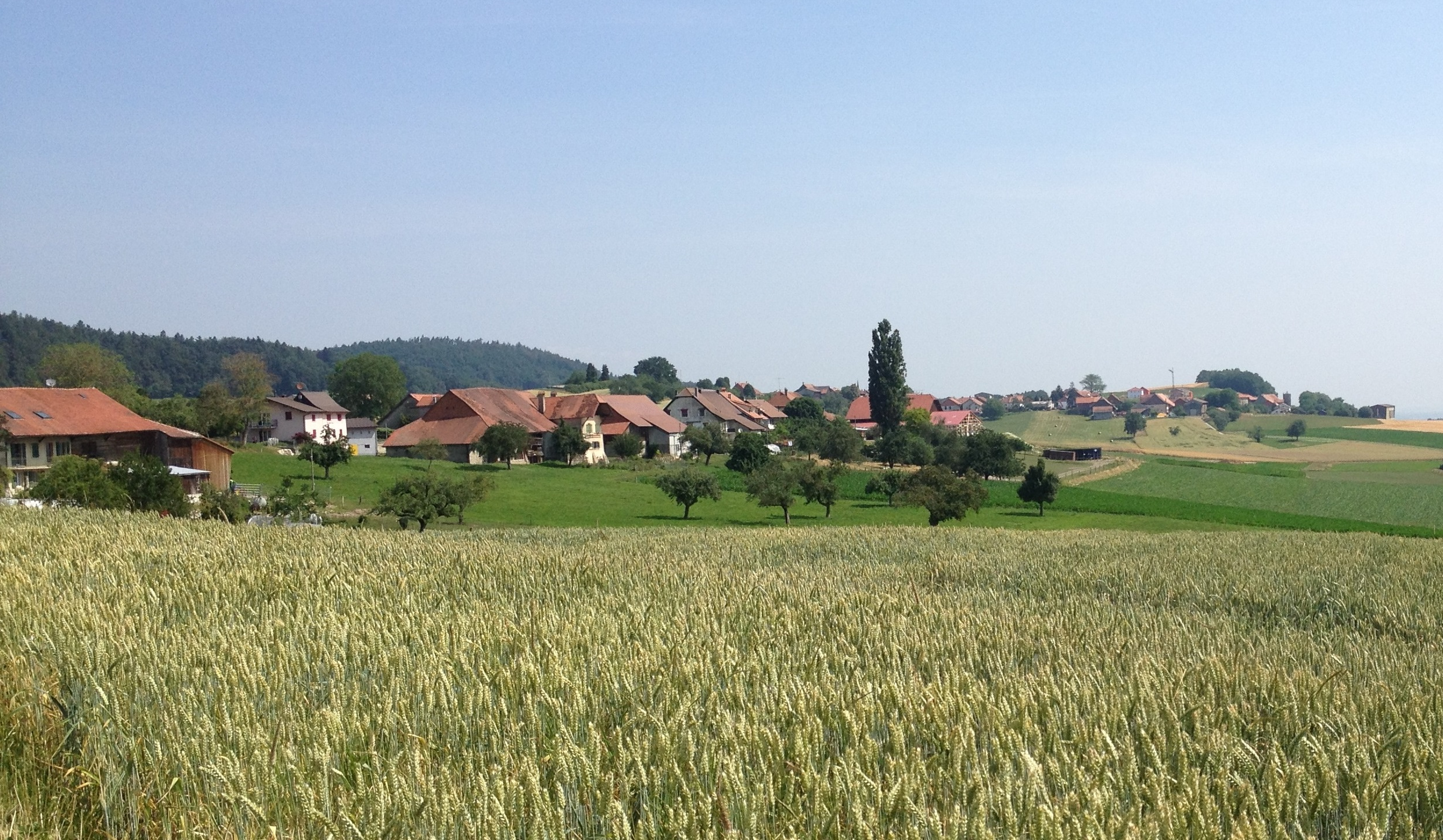 Le village de Chapelle dans la commune fribourgeoise de Cheiry en Suisse, avec le village vaudois de Sassel en arrière-plan.